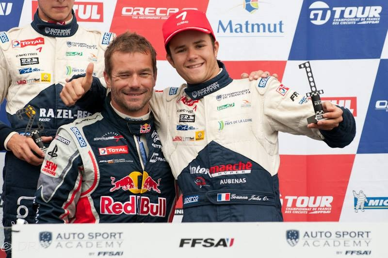 Photographie de Jules Gounon et Sébastien Loeb en 2013.